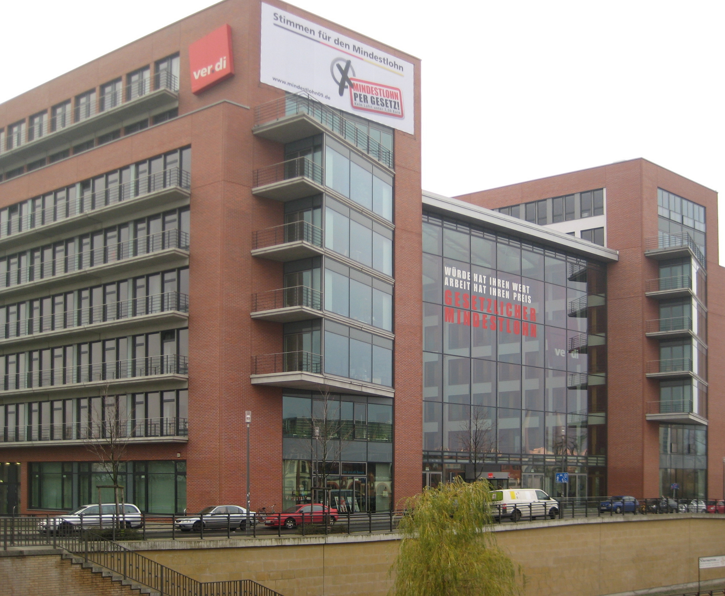 Bundesverwaltung Vereinte Dienstleistungsgewerkschaft (ver.di) am Paula-Thiede-Ufer in Berlin, aufgenommen von der Schillingbrücke